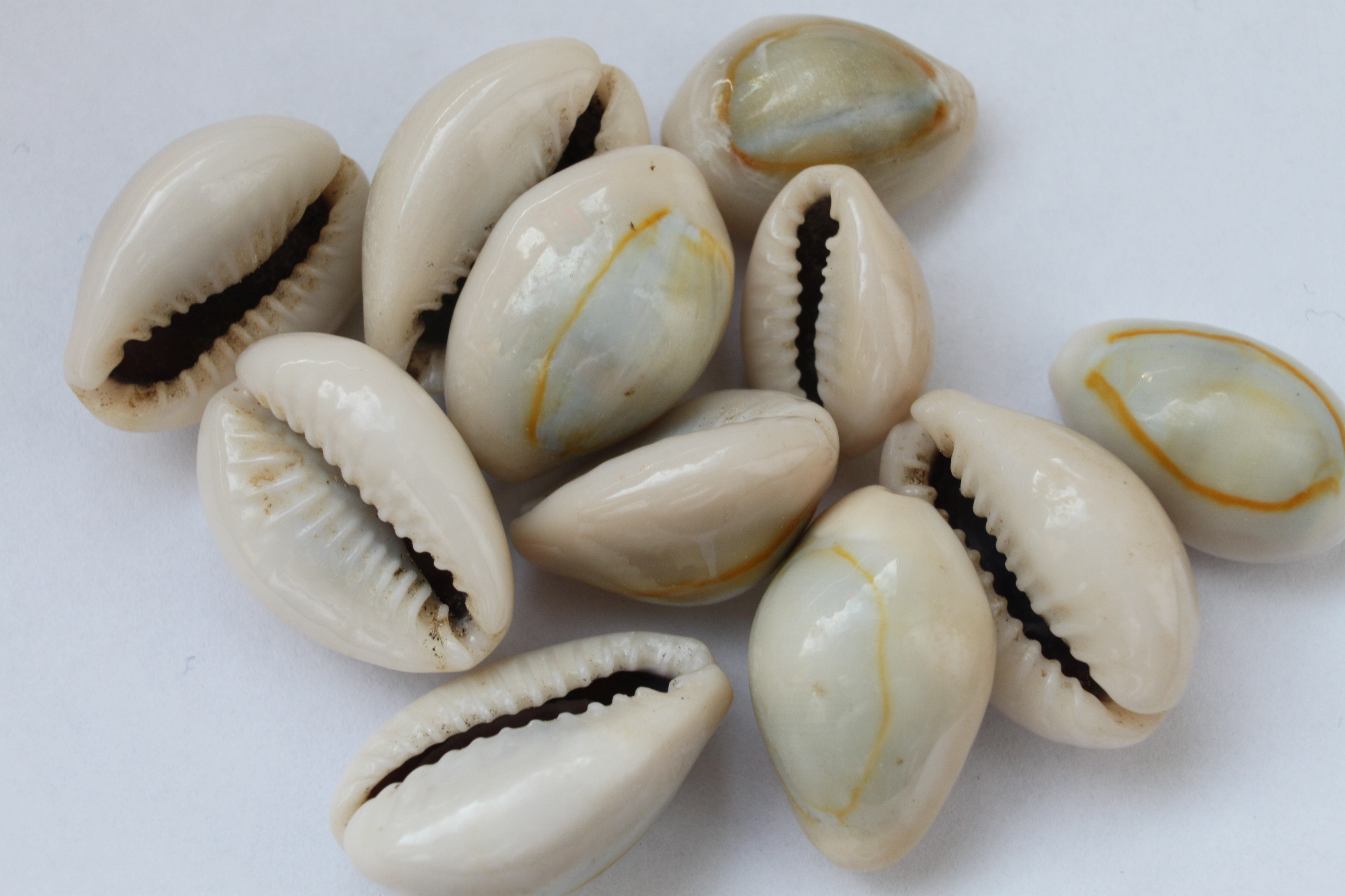 Gehäuse der Monetaria annulus (Ringkauri)), teilweise aufgefräst. Diese wurden neben der Monetaria moneta (Geldkauri) als Kaurigeld verwendet